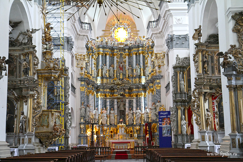 Гродна. Інтэр'ер езуіцкага касцёла